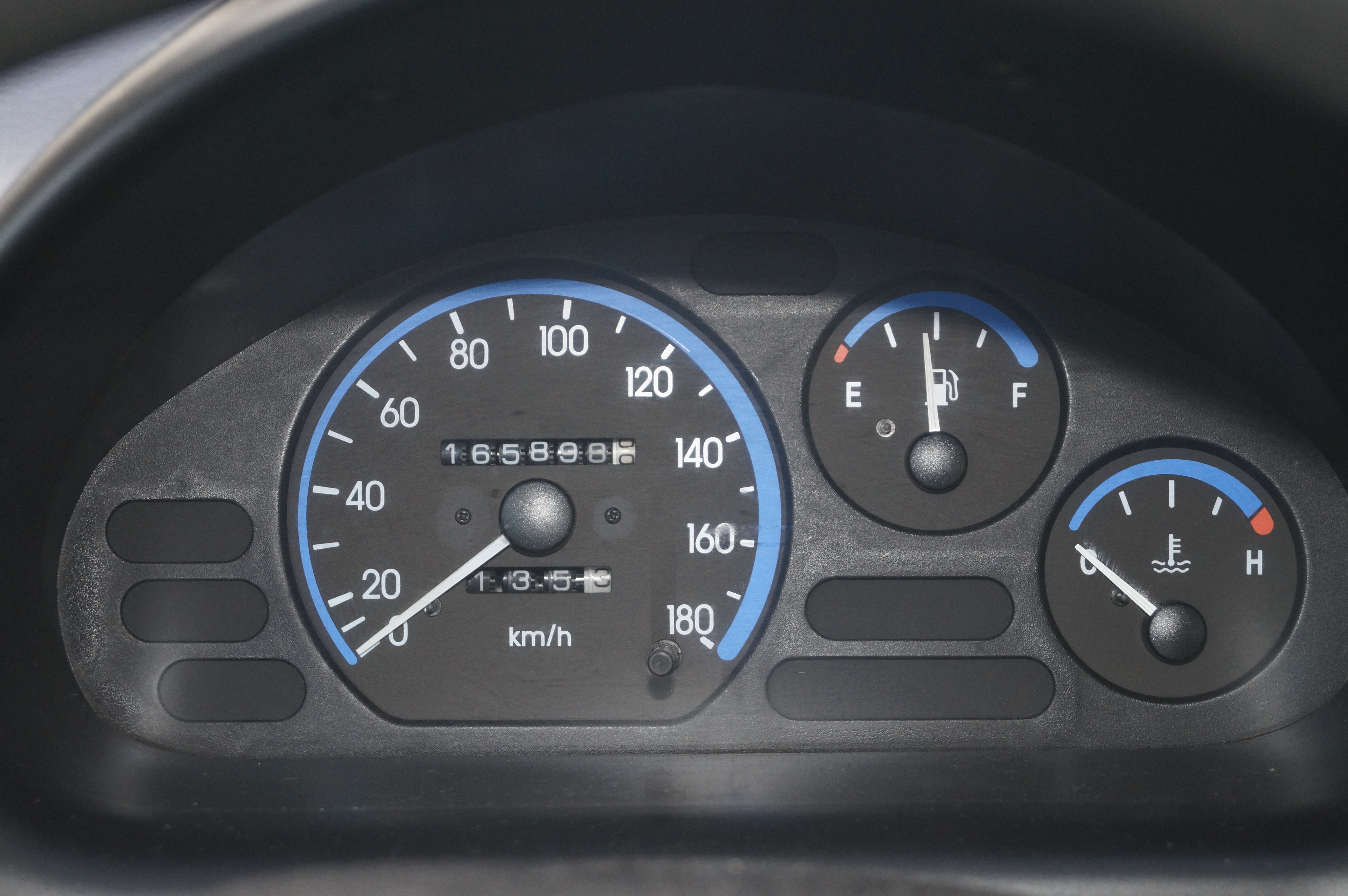 Zestaw wskaźników Daewoo Matiza M100 (od lewej prędkościomierz, wskaźnik poziomu paliwa i wskaźnik temperatury cieczy chłodzącej)